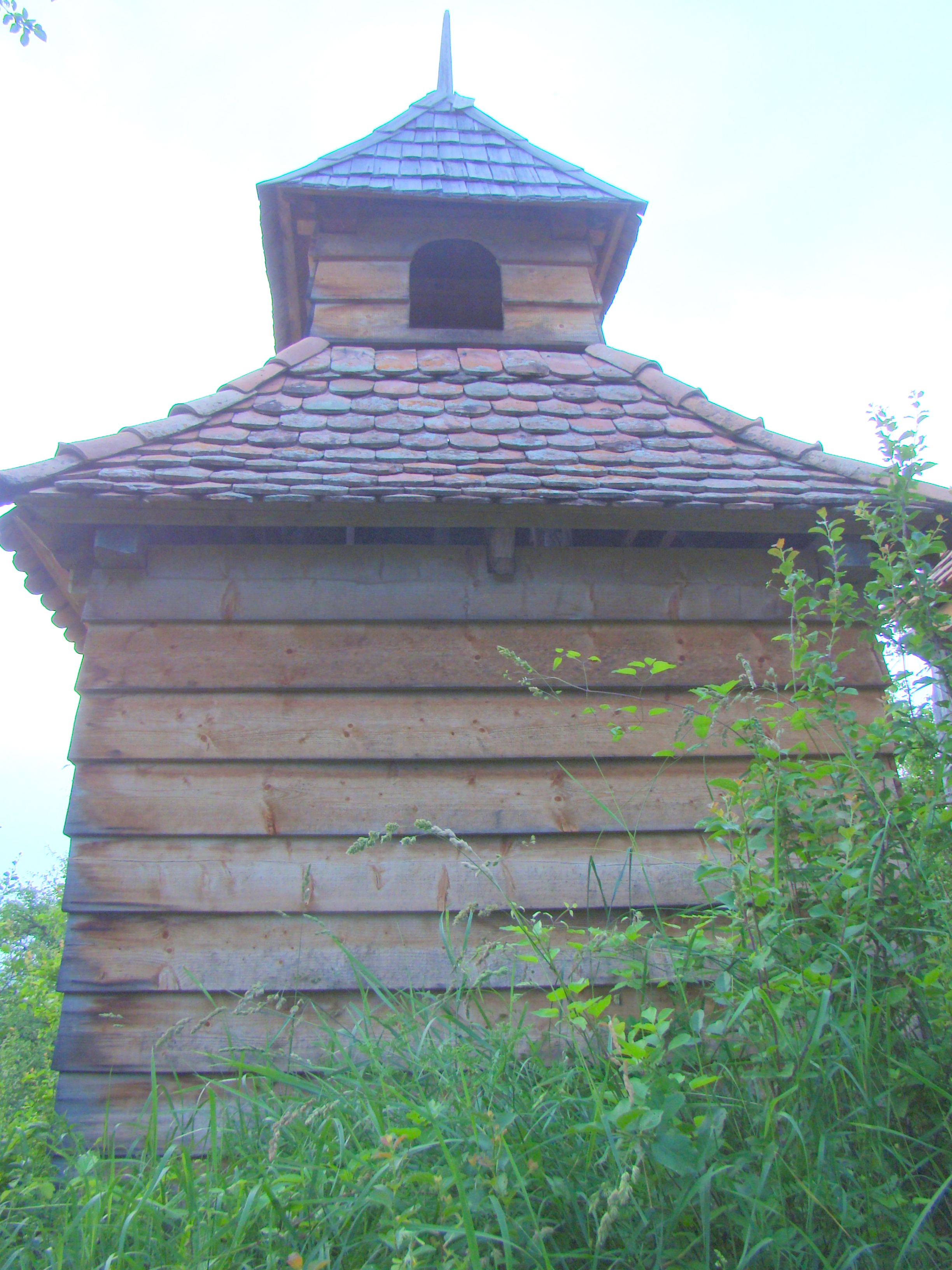 Biserica de lemn „Cuvioasa Paraschiva”, sat Grânari; comuna Jibert, str. Școlii, în cimitirul ortodox vechi sec. XVIII